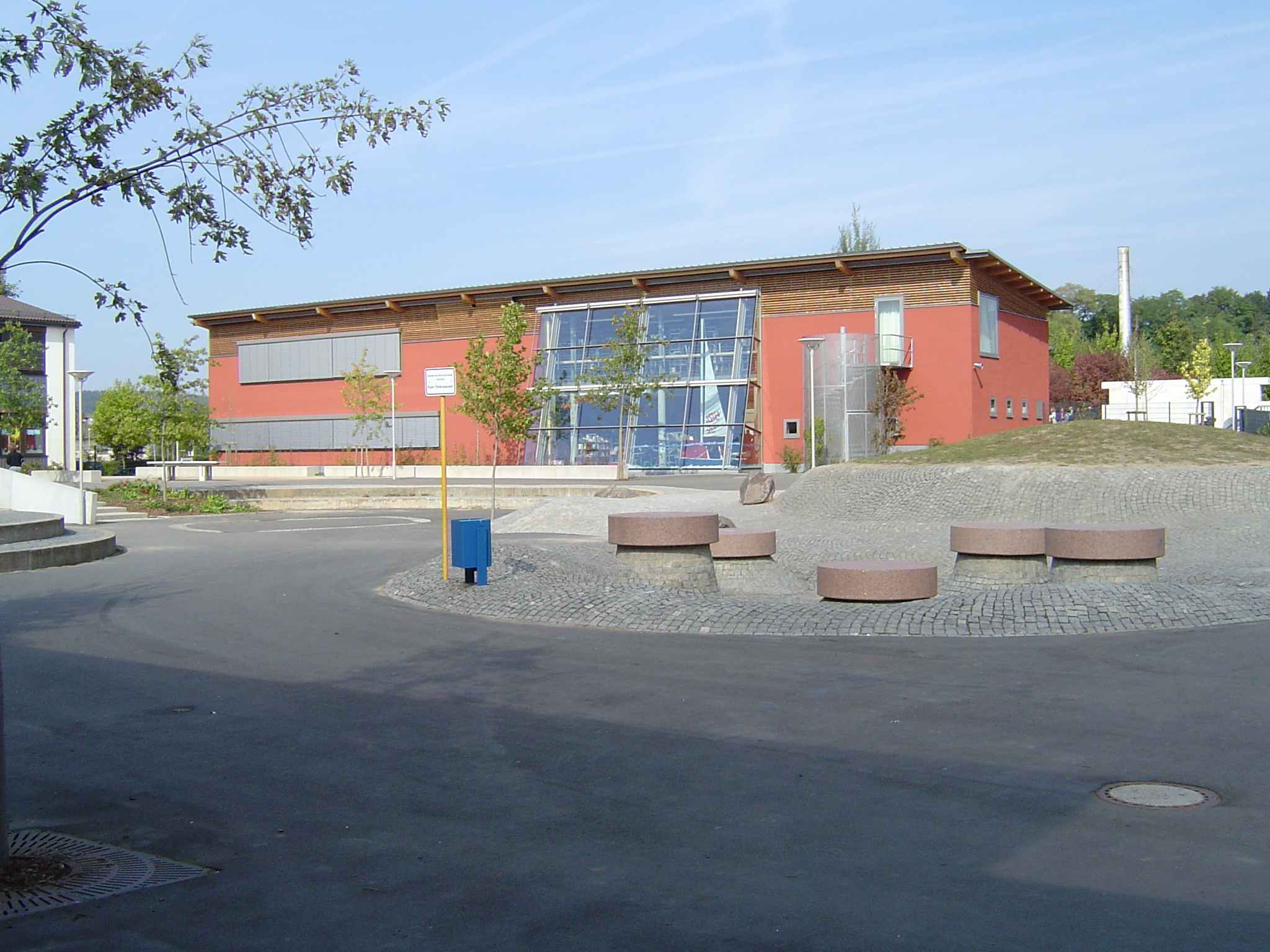 Library Building of Hanns-Seidel-Gymnasium Hösbach (photographed in 2003)